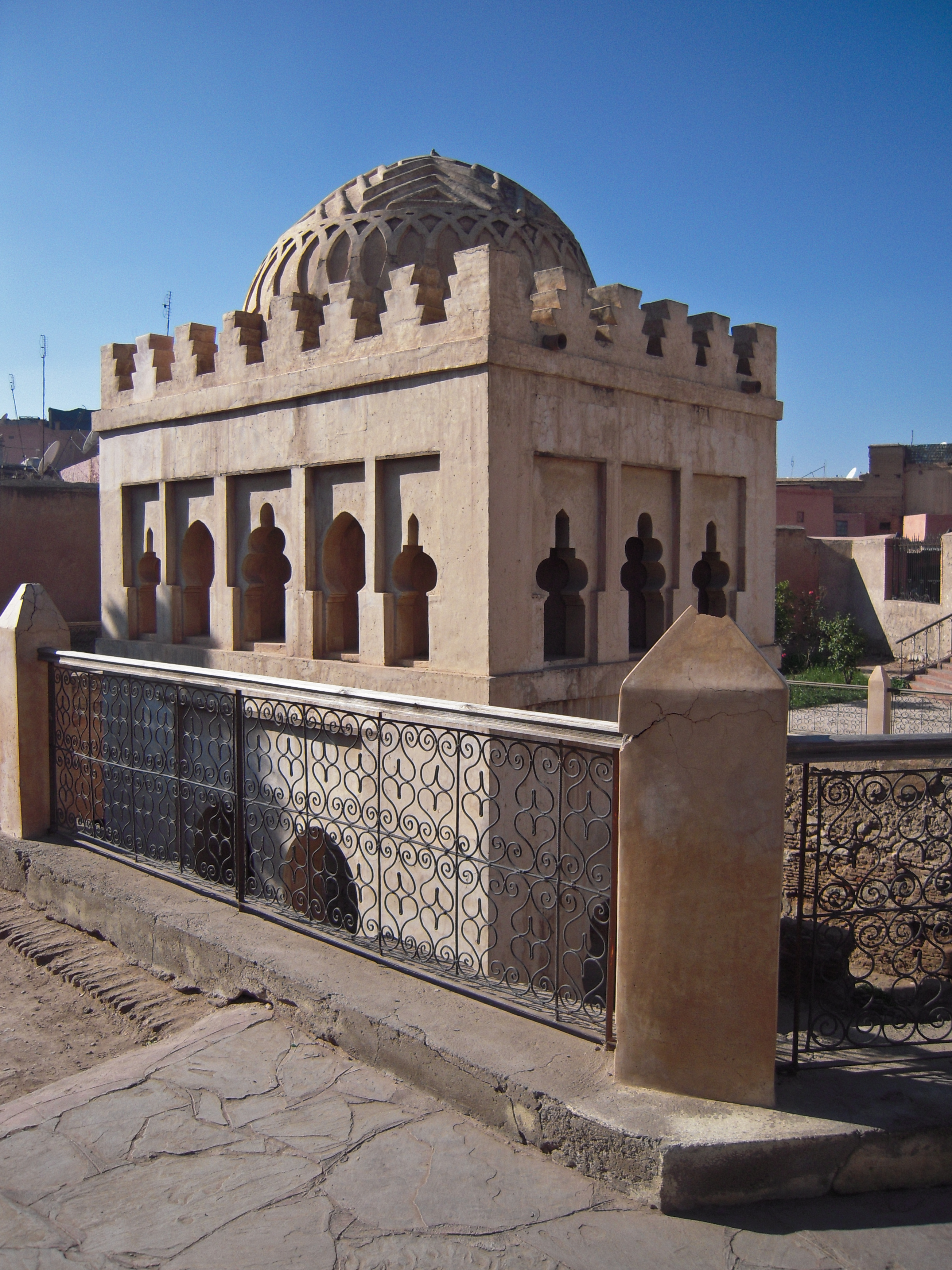 Marrakesh, Almoravid Koubba